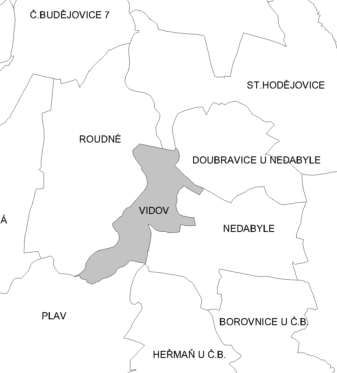 Katastrální území Vidova